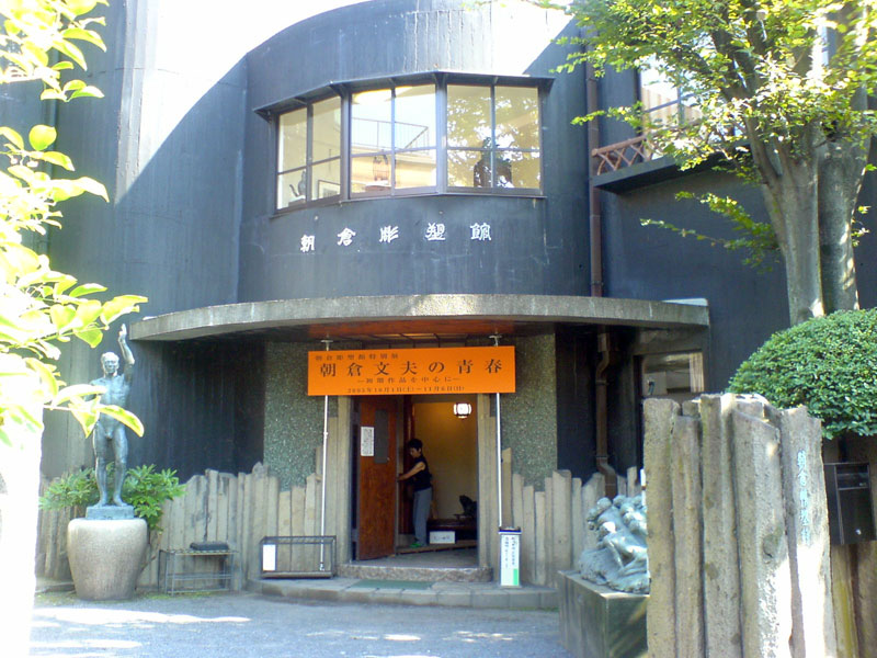 朝倉彫塑館の玄関。